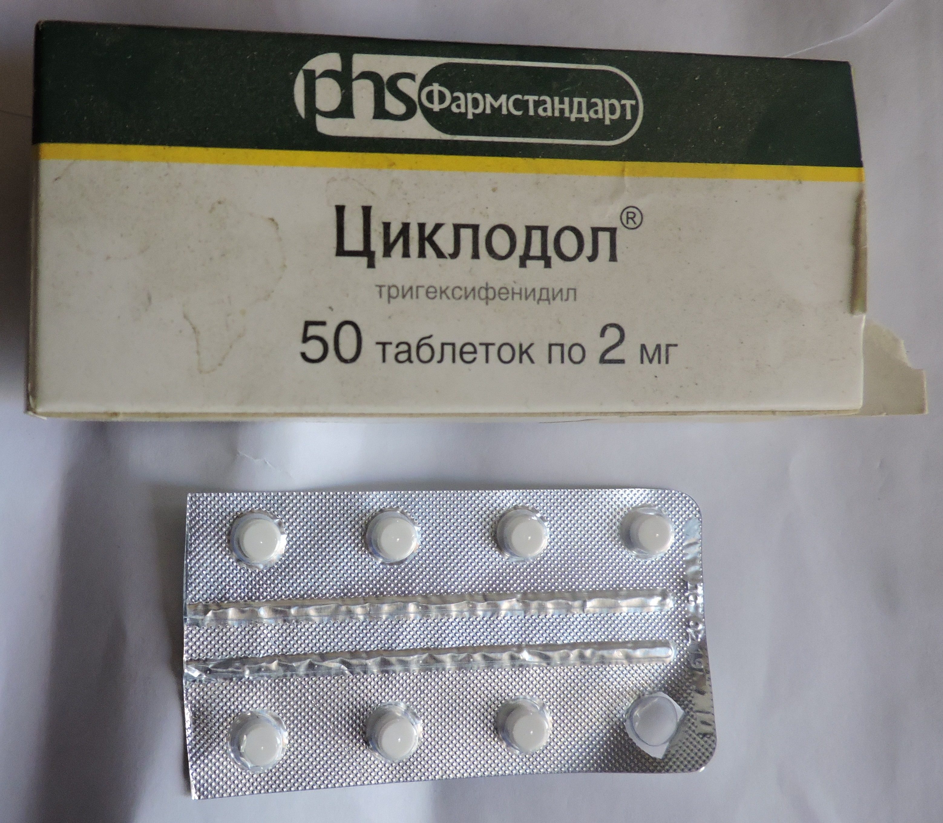 Таблетки циклодола